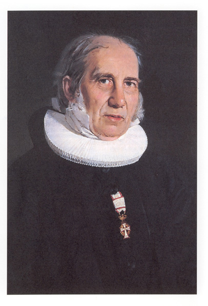 N.F.S. Grundtvig, der Theologe Künstler: C.A. Jensen 1843 Sammlung: Den Hirschsprungske Samling Dänemark